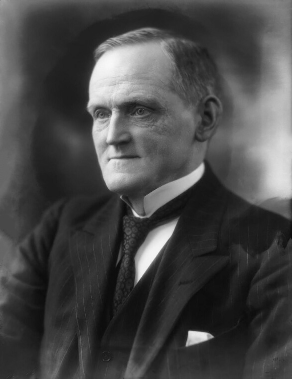 Lord Snowden